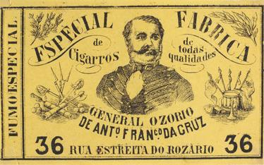 Rótulo de cigarro. General Manuel Luís Osório.